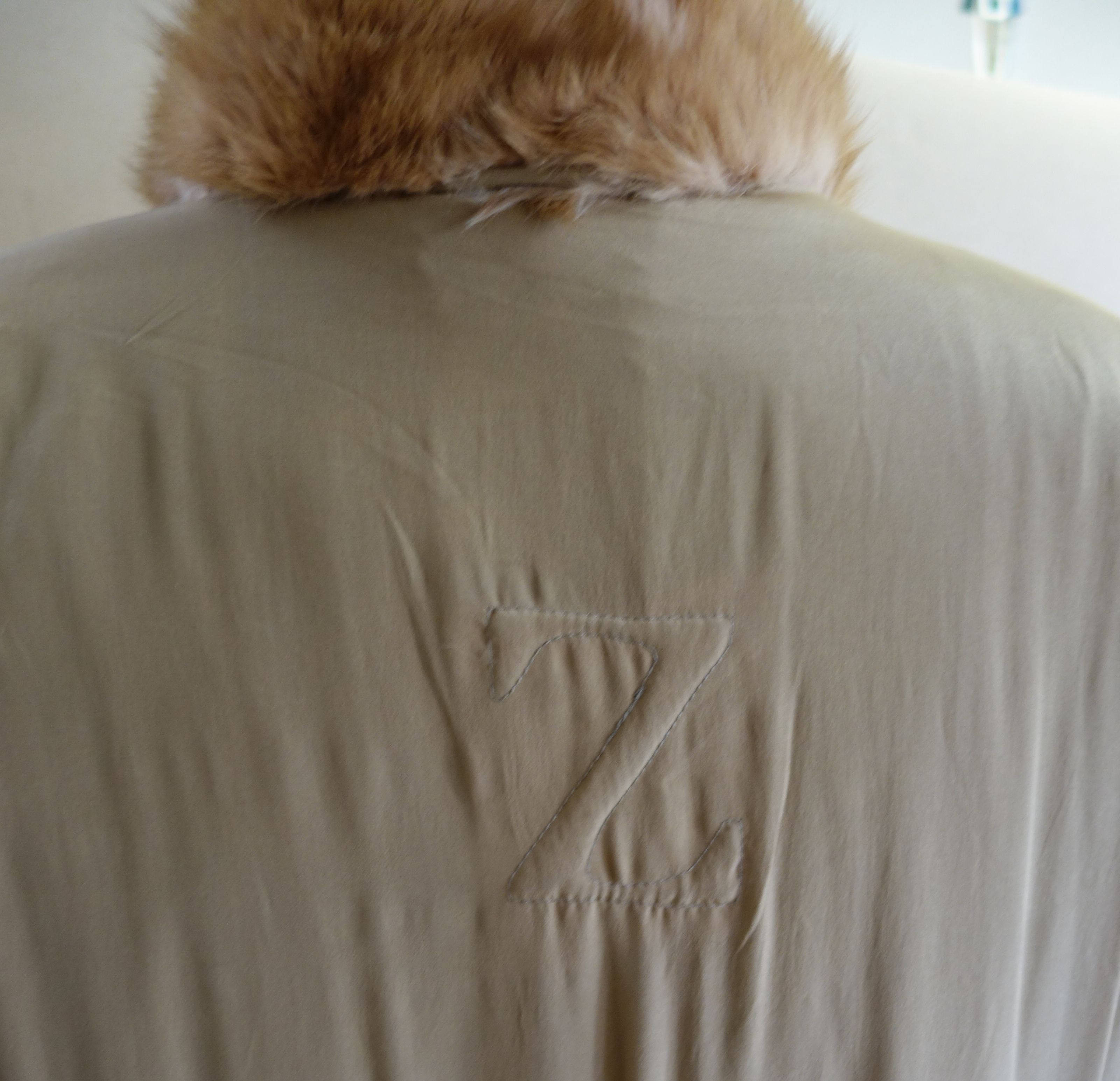 Goldzobel-Mantel, Dieter Zoern, Hamburg. Etwa 30 Jahre alt. Firmenlogo im Mantelfutter.